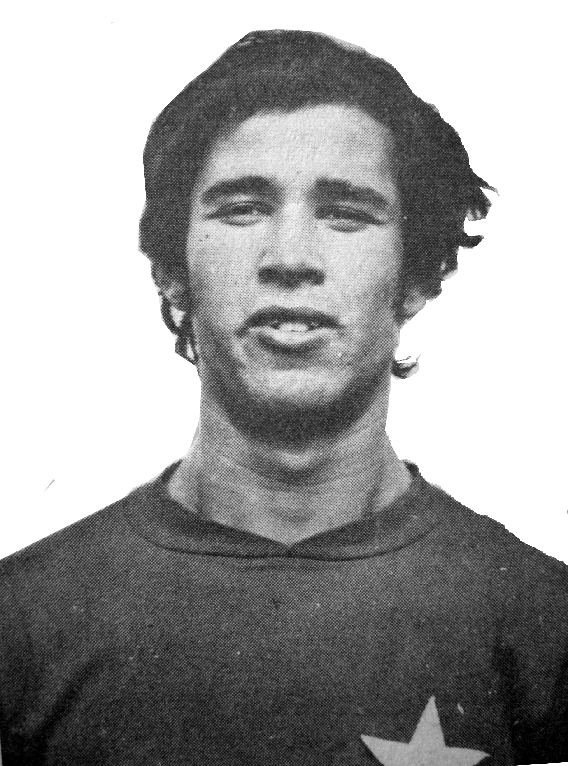 Raouf Ben Aziza, ancien joueur international tunisien et de l'Étoile du Sahel dans les années 1970